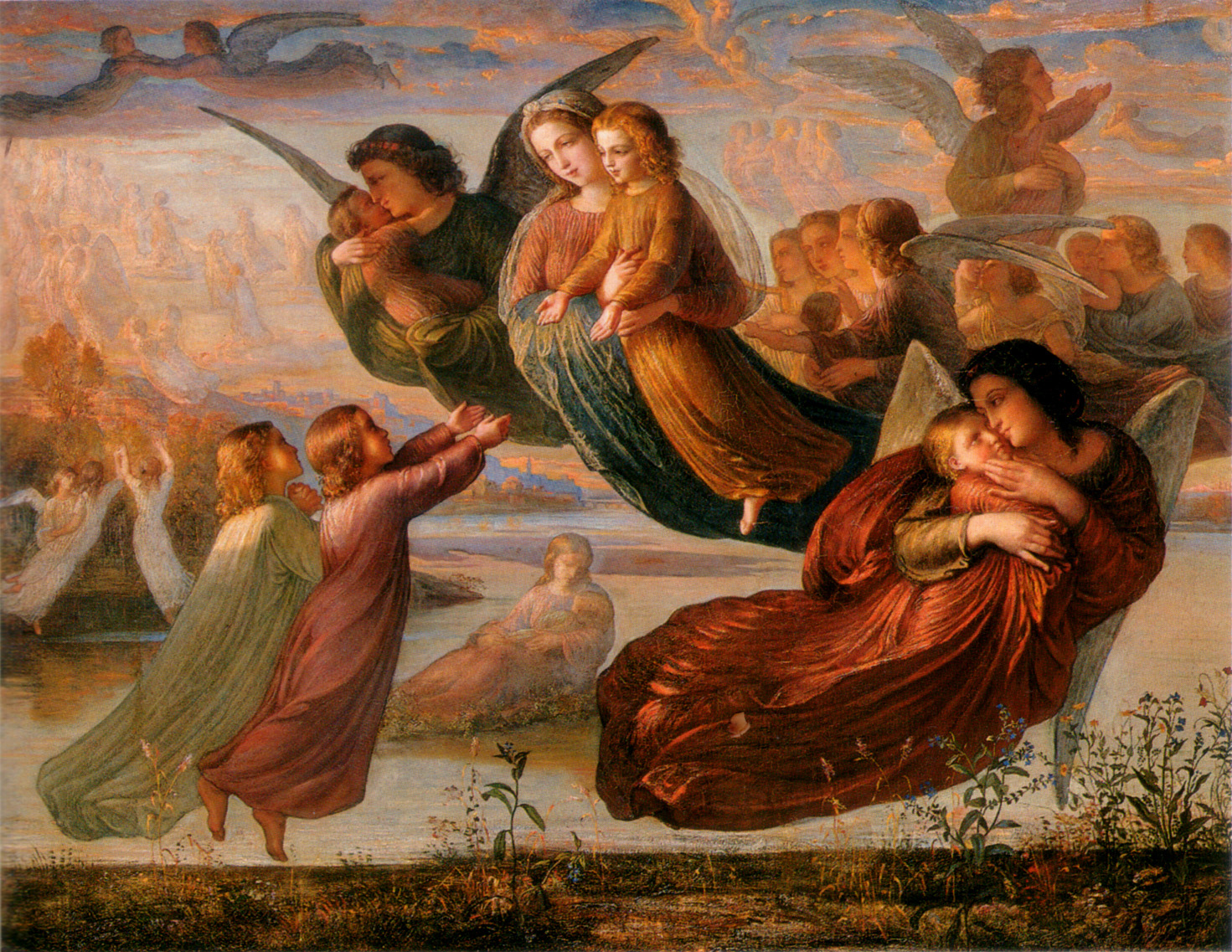 Poème de l'âme (5)